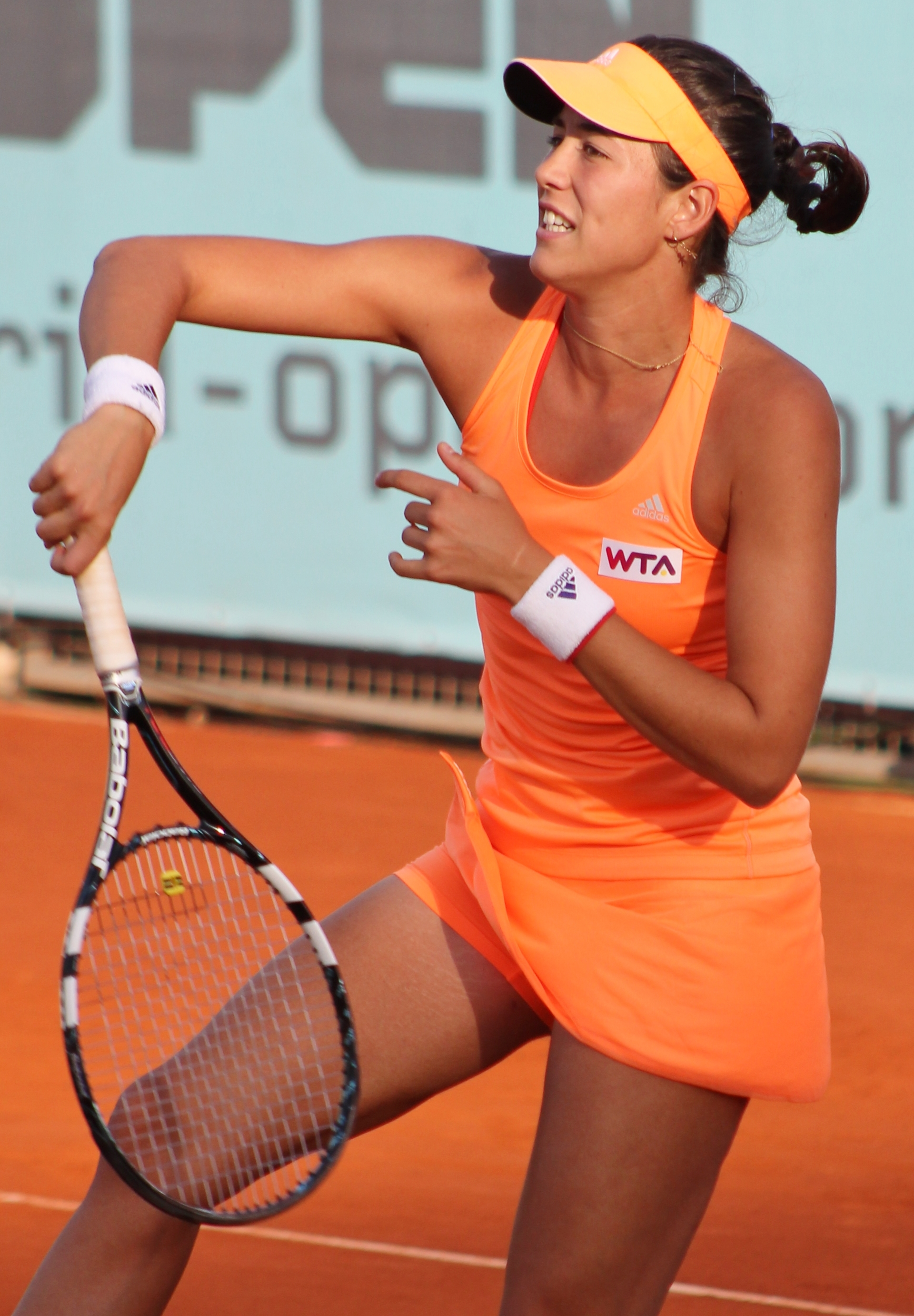 Muguruza MA14 (8)